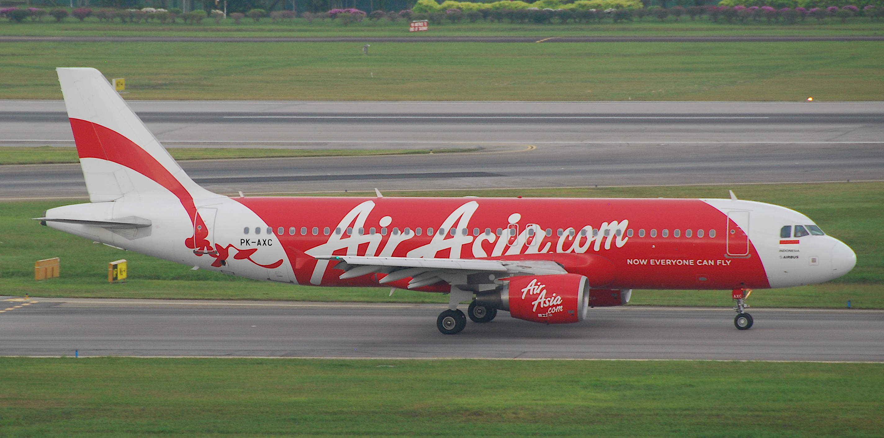 Indonesia AirAsia Airbus A320-216; PK-AXC@SIN;07.08.2011/617eo